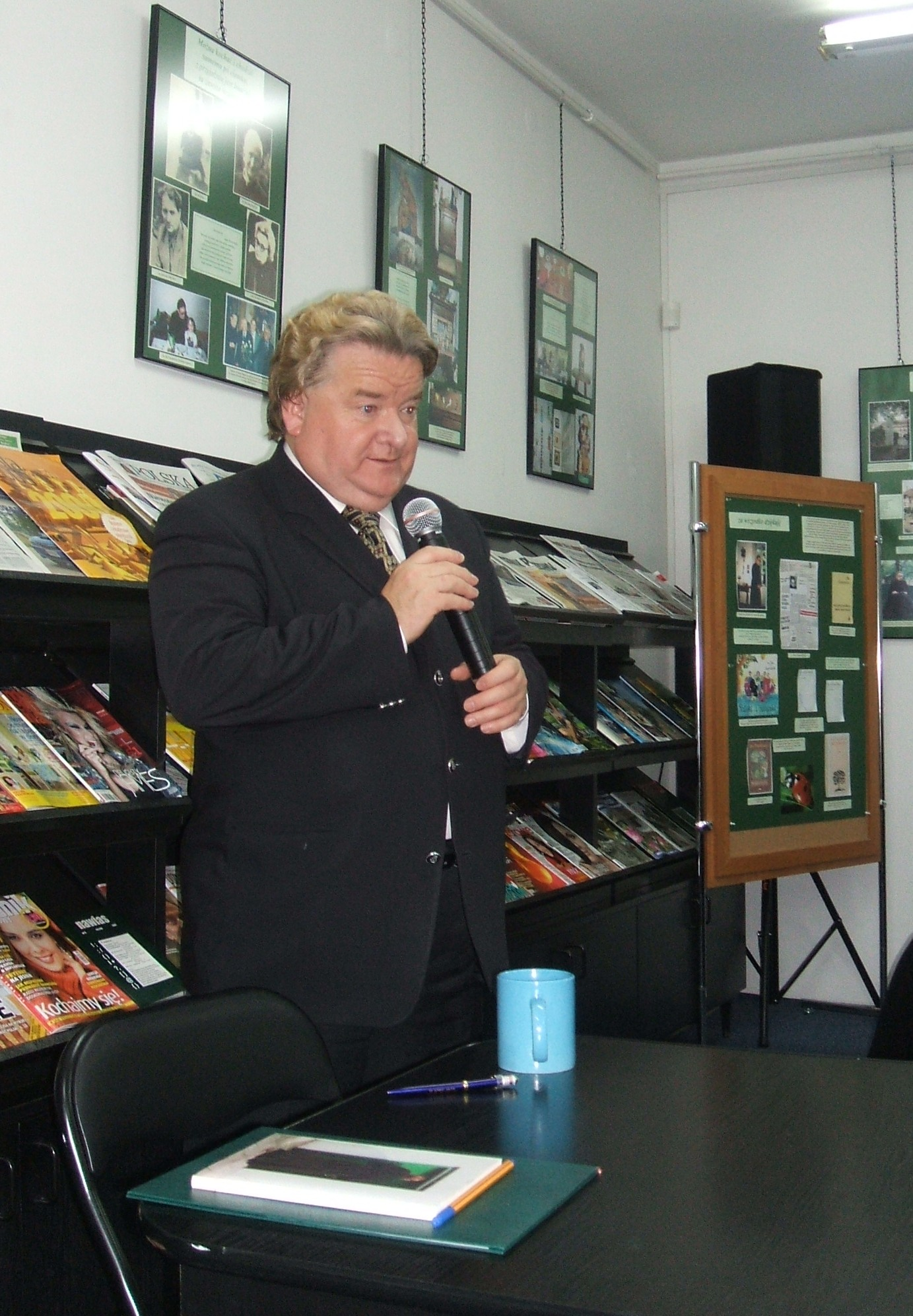 Waldemar Smaszcz w trakcie prelekcji w Miejskiej Bibliotece Publicznej im. Zofii Nałkowskiej w Sierpcu